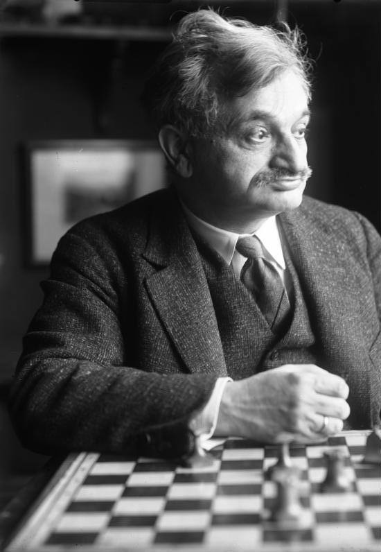 Dr. Emanuel Lascer, Ex-Schachweltmeister, Aufnahme am 19. März 1929